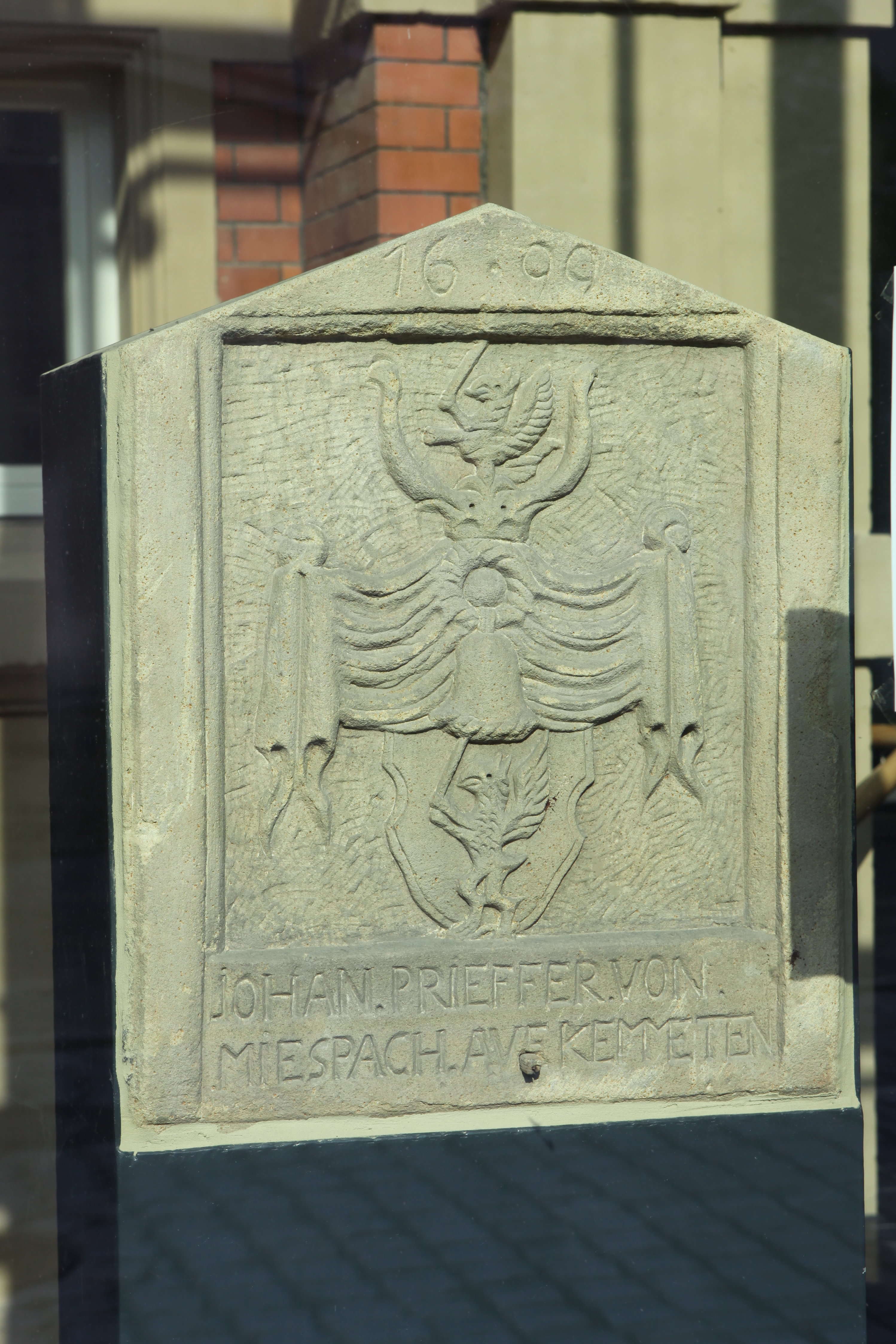 Hauszeichen 1699, Sonneberg, Untere Marktstraße 2